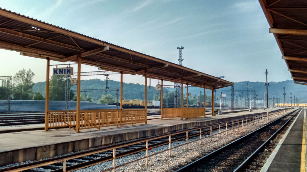 Dan pobjede i domovinske zahvalnosti, Dan hrvatskih branitelja